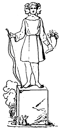 Святовит, идол в храме Аркона по описанию Саксона Грамматика